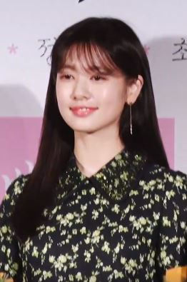 14일 오전 서울 중구 메가박스 동대문에서 열린 영화 '기방도령' 제작보고회